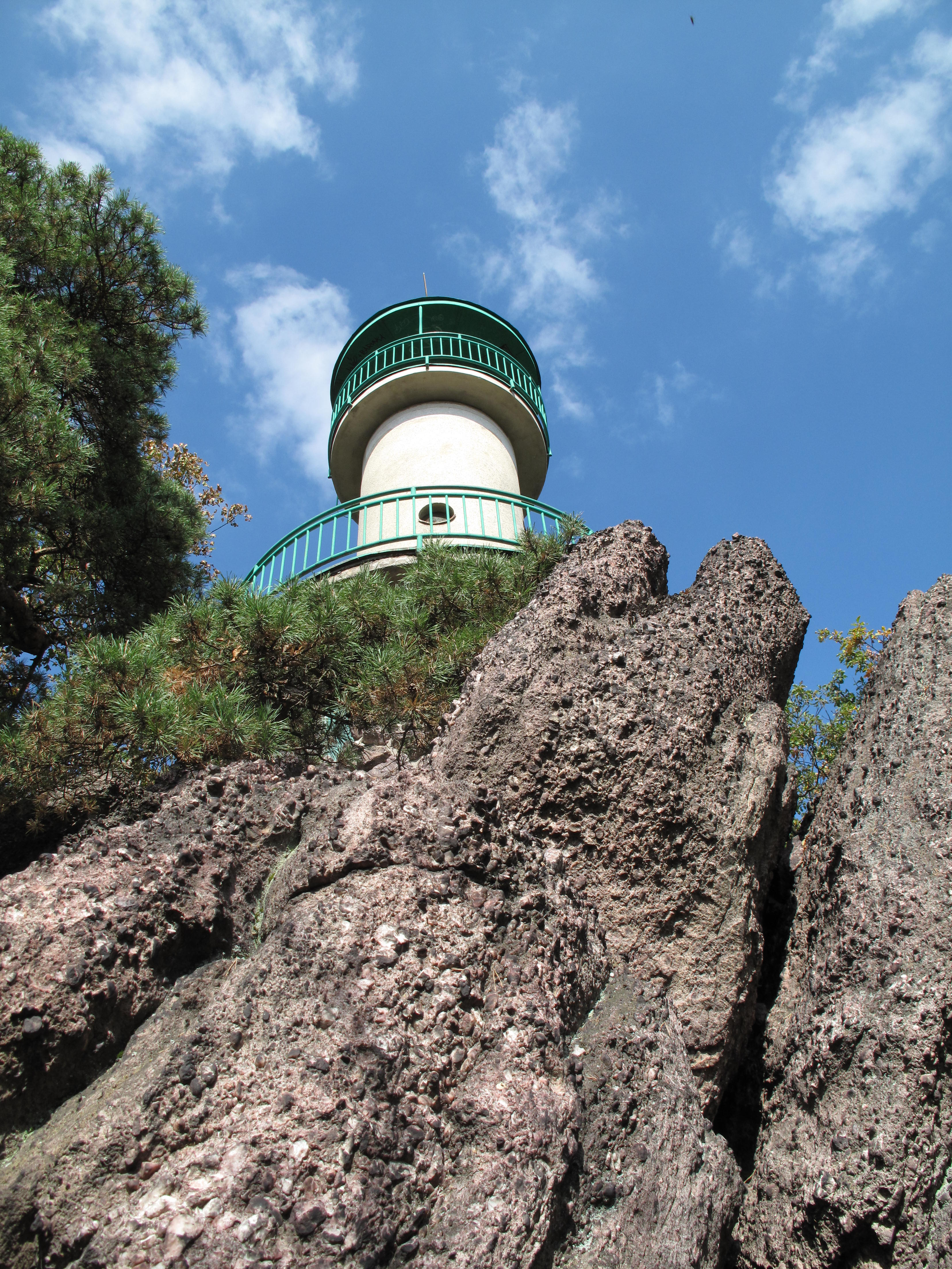 rozhledna Babí Lom